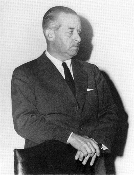 Fotografía del Arq. Mario J. Buschiazzo, fundador del Instituto de Arte Americano e Investigaciones Estéticas que lleva su nombre y funciona en la Facultad de Arquitectura, Diseño y Urbanismo de la Universidad de Buenos Aires